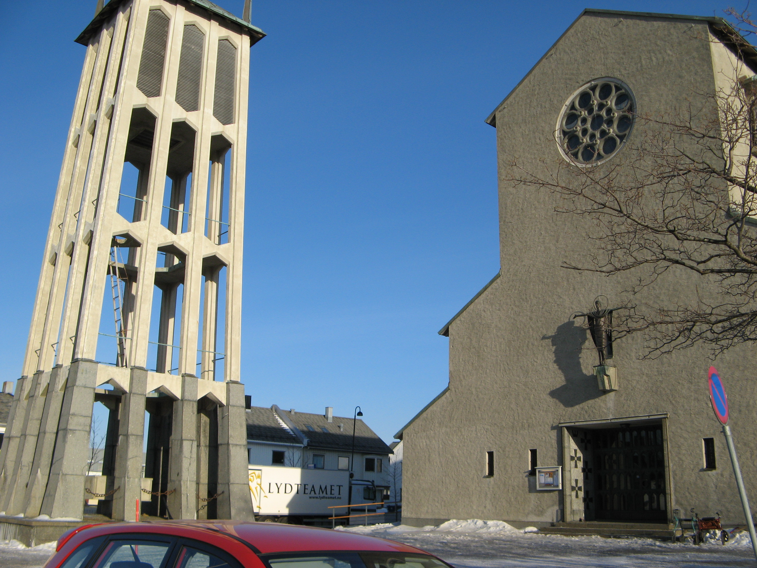 Klokketårn og inngangsparti i Bodø domkirke